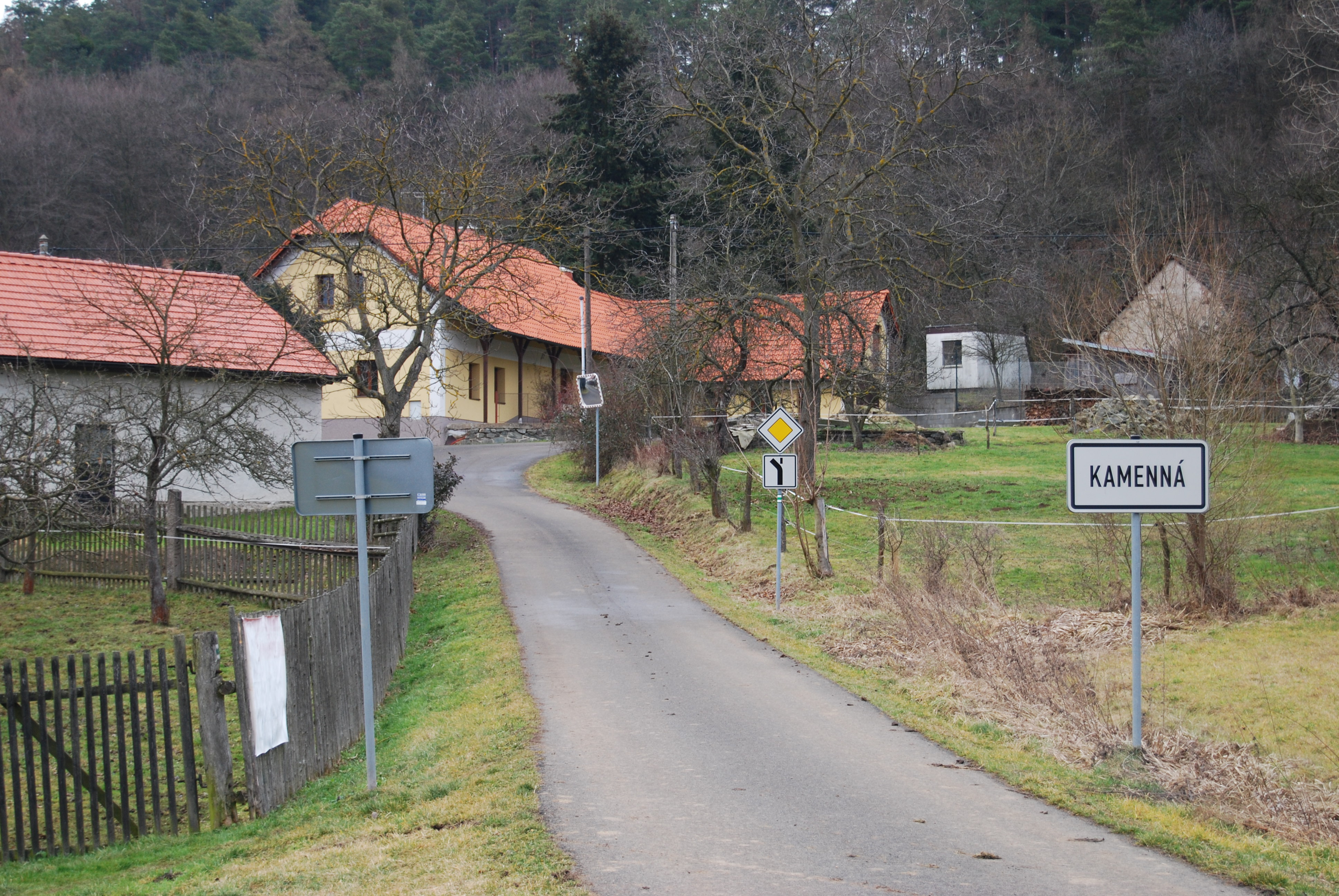 Příjezdová komunikace do vesnice. Kamenná (Bohostice) v okrese Příbram, kraj Středočeský. Česká republika.